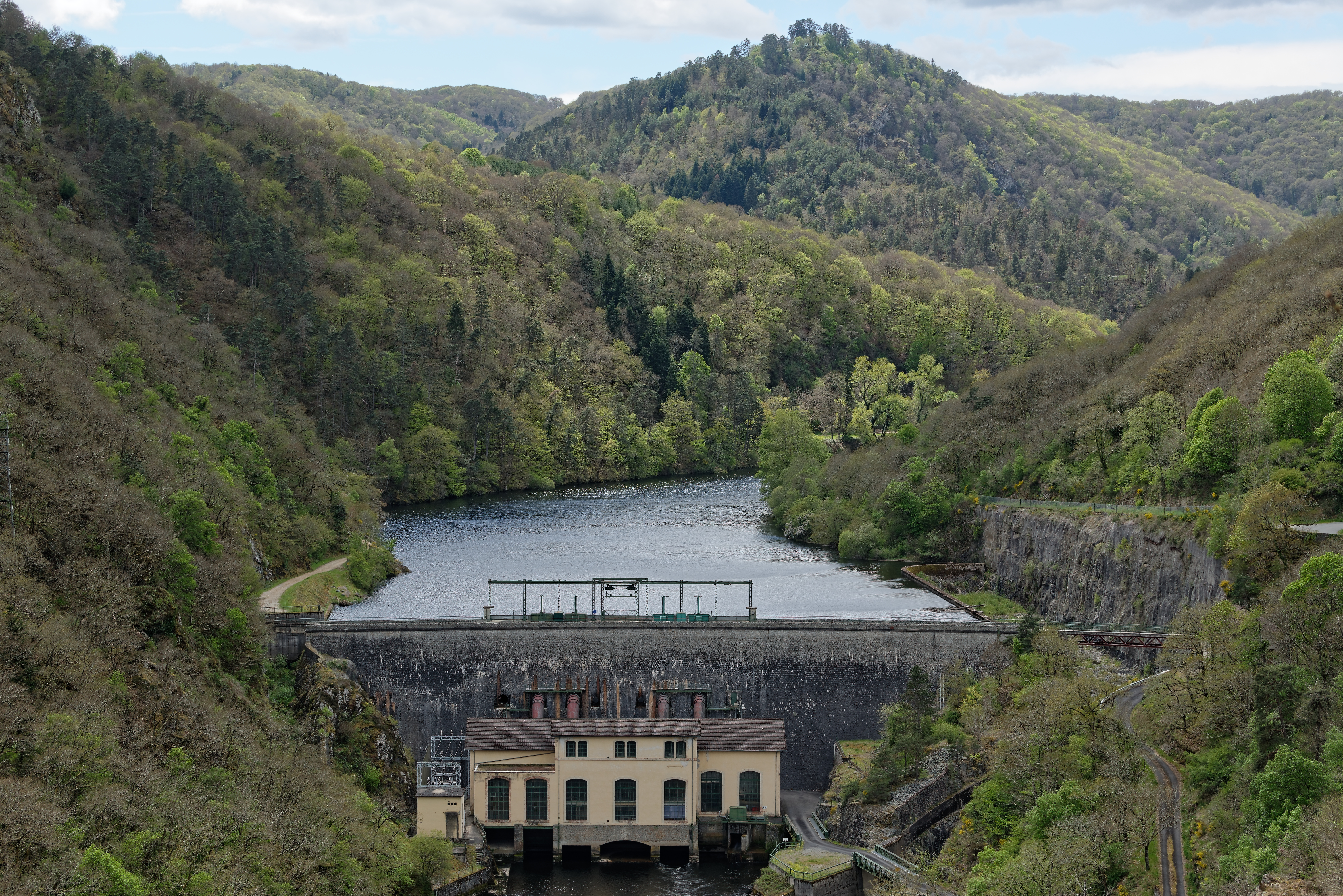 Barrage hydroélectrique de Queuille, dans le Puy-de-Dôme, vu depuis l'aval.